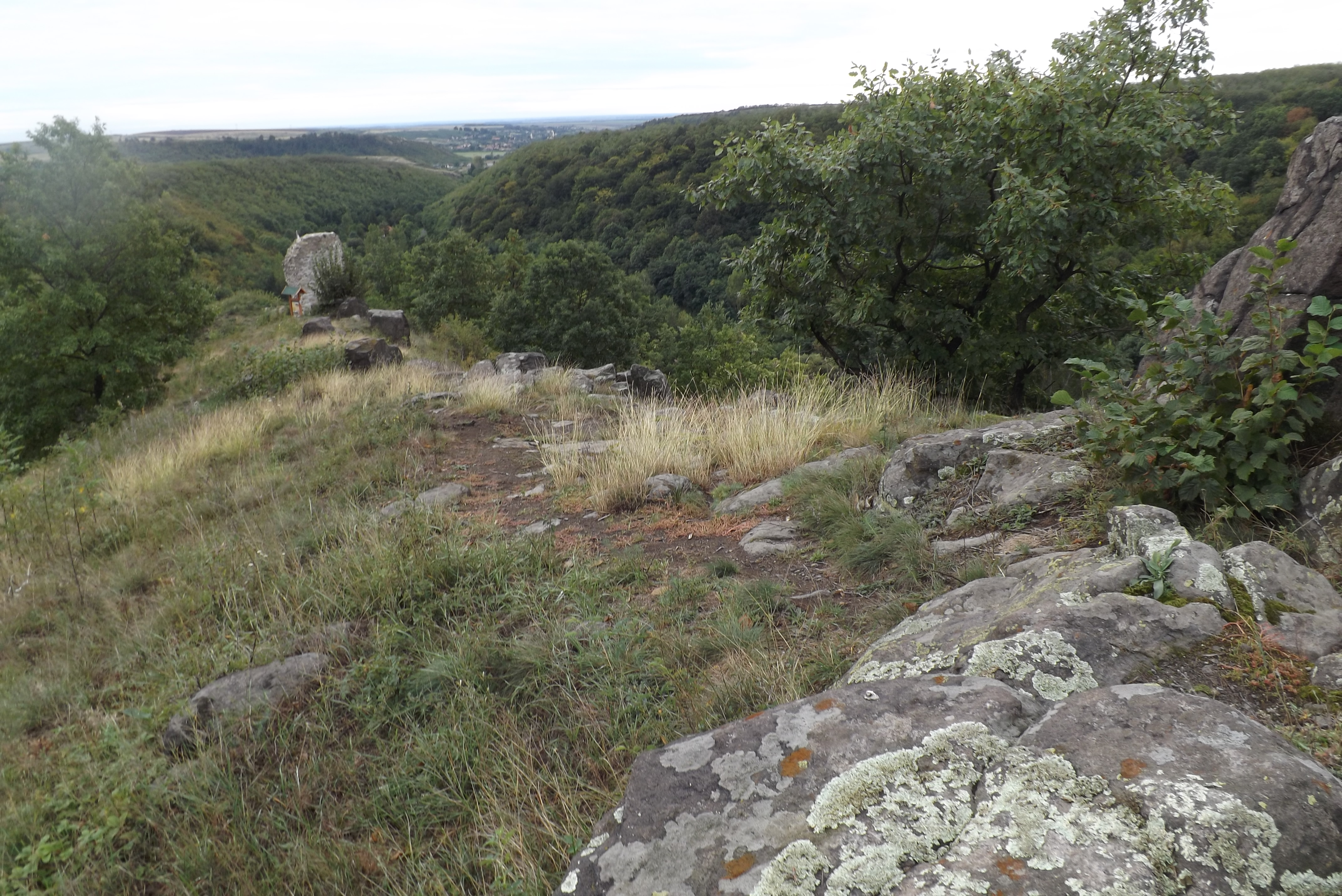 Latortető, előtérben Latorvár maradványai